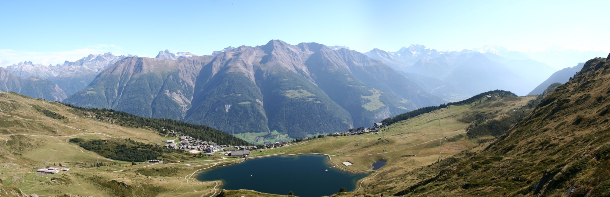 Village de Bettmeralp, Valais, Suisse